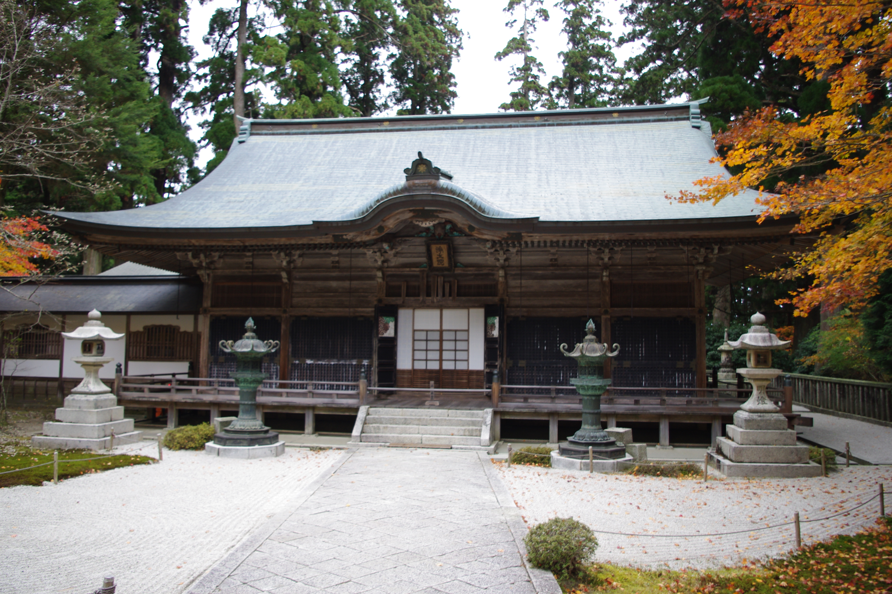 15 Nov, 2010